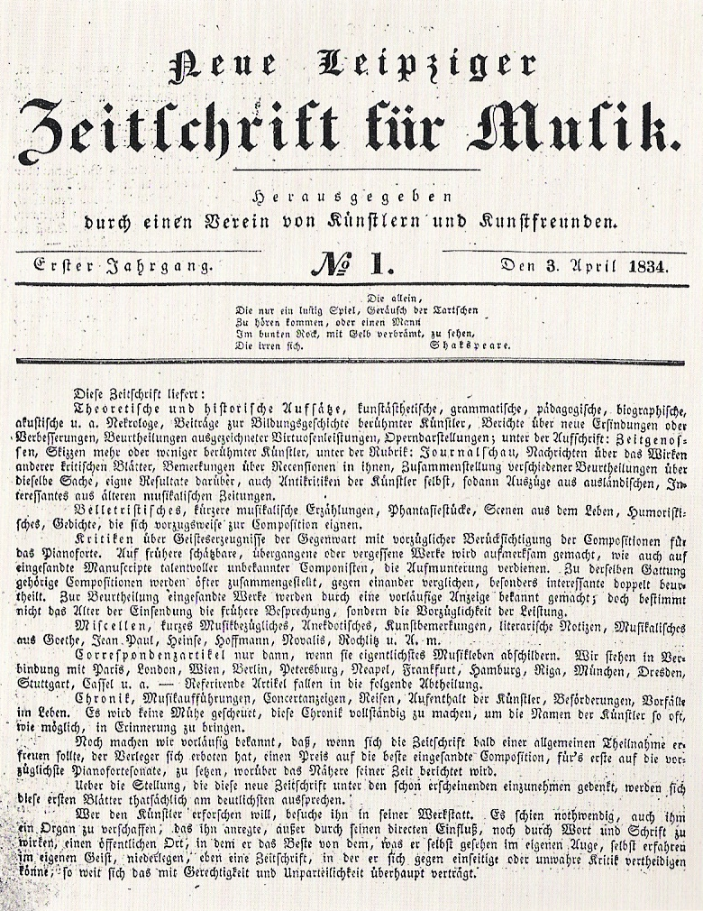 Titelseite der Erstausgabe der Neuen Leipziger Zeitschrift für Musik, die 1835 umbenannt wurde in Neue Zeitschrift für Musik.